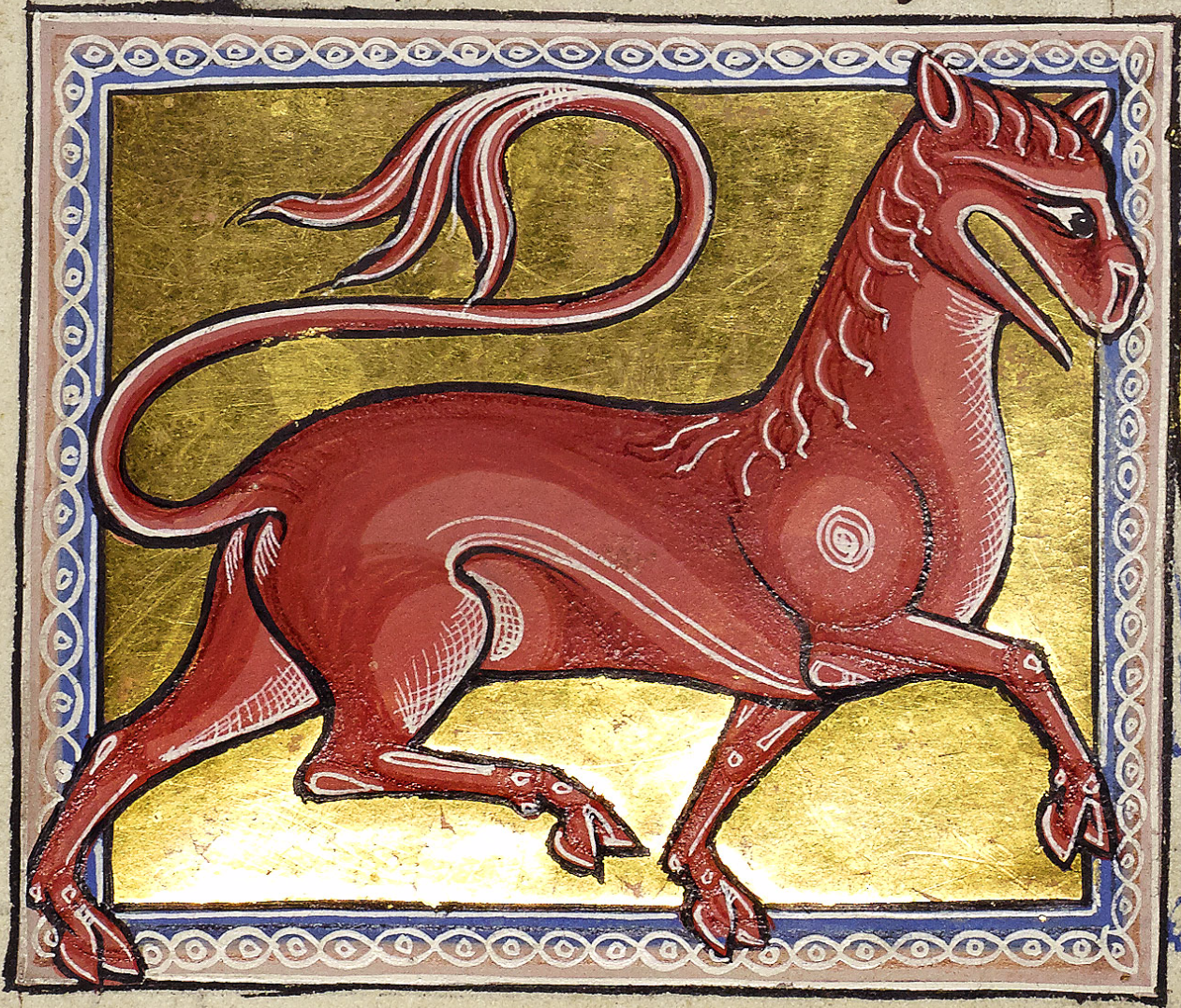 FOLIO-15V. Внизу страницы представлено изображение левкрота — животного, происходящего из Индии. Оно имеет рост, как у осла, заднюю часть, похожую на круп оленя, а грудь и голову — львиные. У левкота нет зубов.